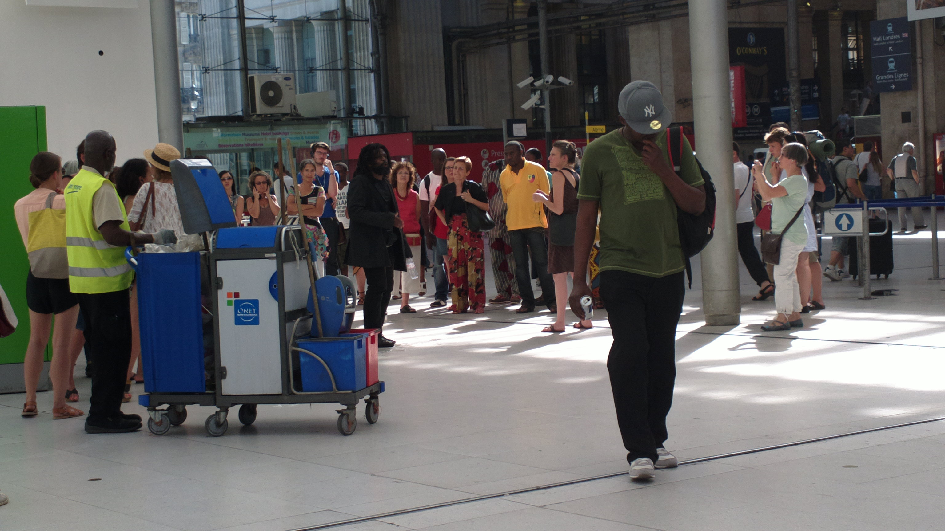 Agoraphobia de Rob de Graaf, mise en scène de Lotte Van den Berg avec Soeuf Elbadawi. Le 4 août 2013 à Gare de Paris-Nord pendant le Festival Paris quartier d'été